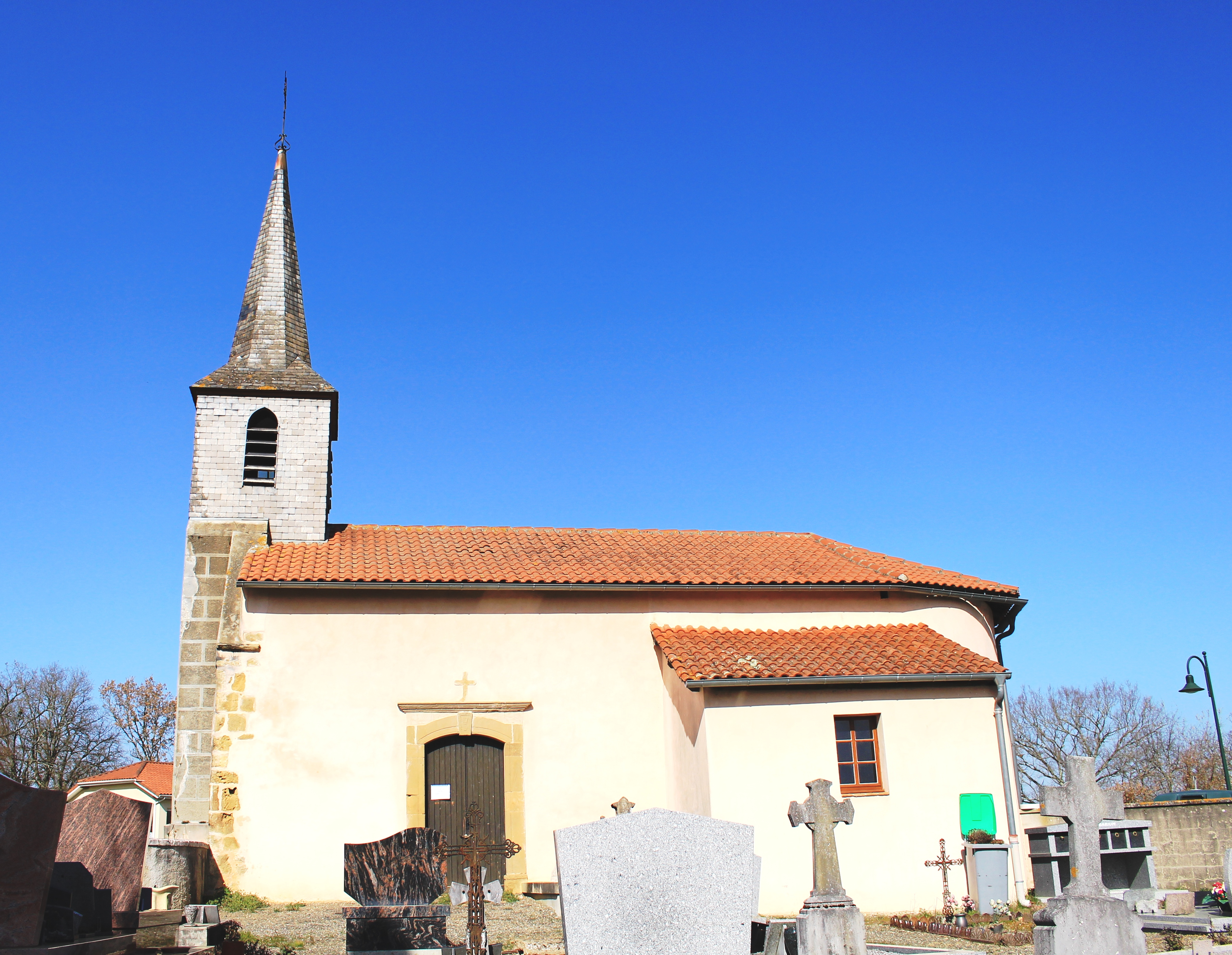 Église Saint-Laurent de Bouilh-Devant (Hautes-Pyrénées)